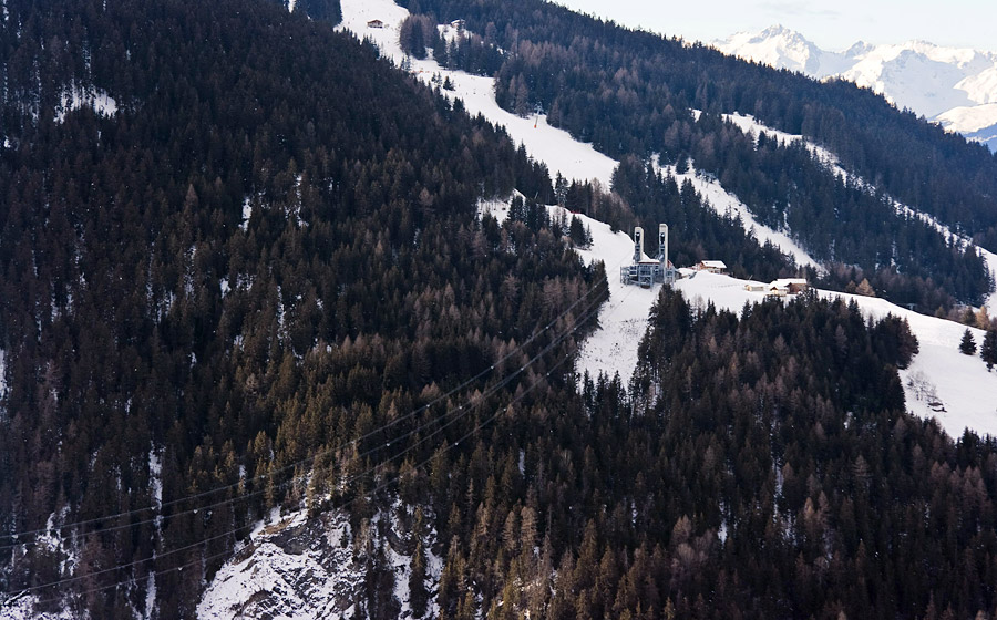 Vanoise Express